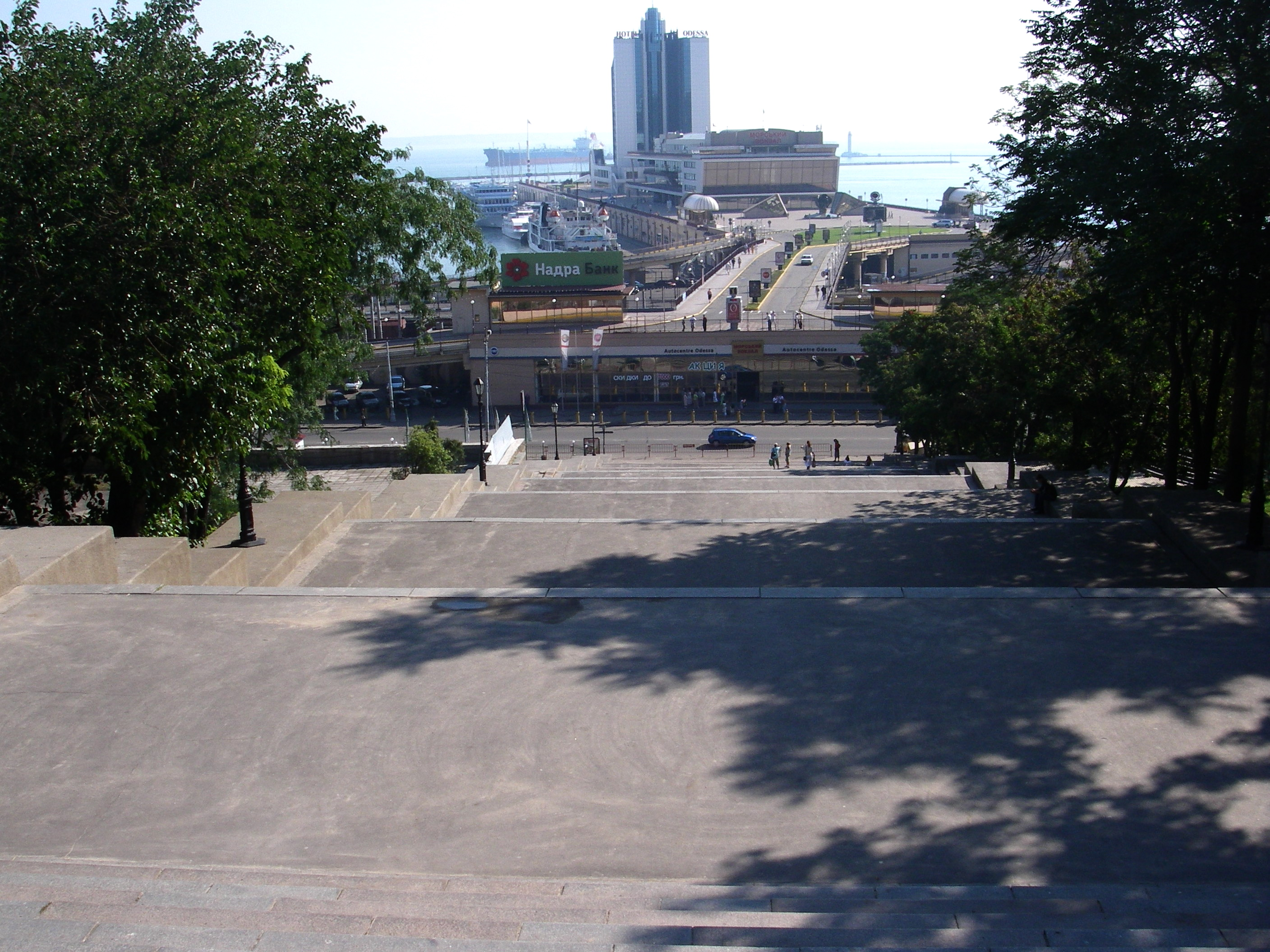 Blick von der Potemkinschen Treppe zum Hafen